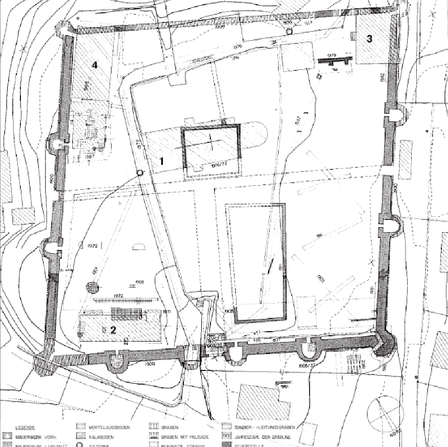 Befundplan Kastell Eschenz/Tasgetium (CH)